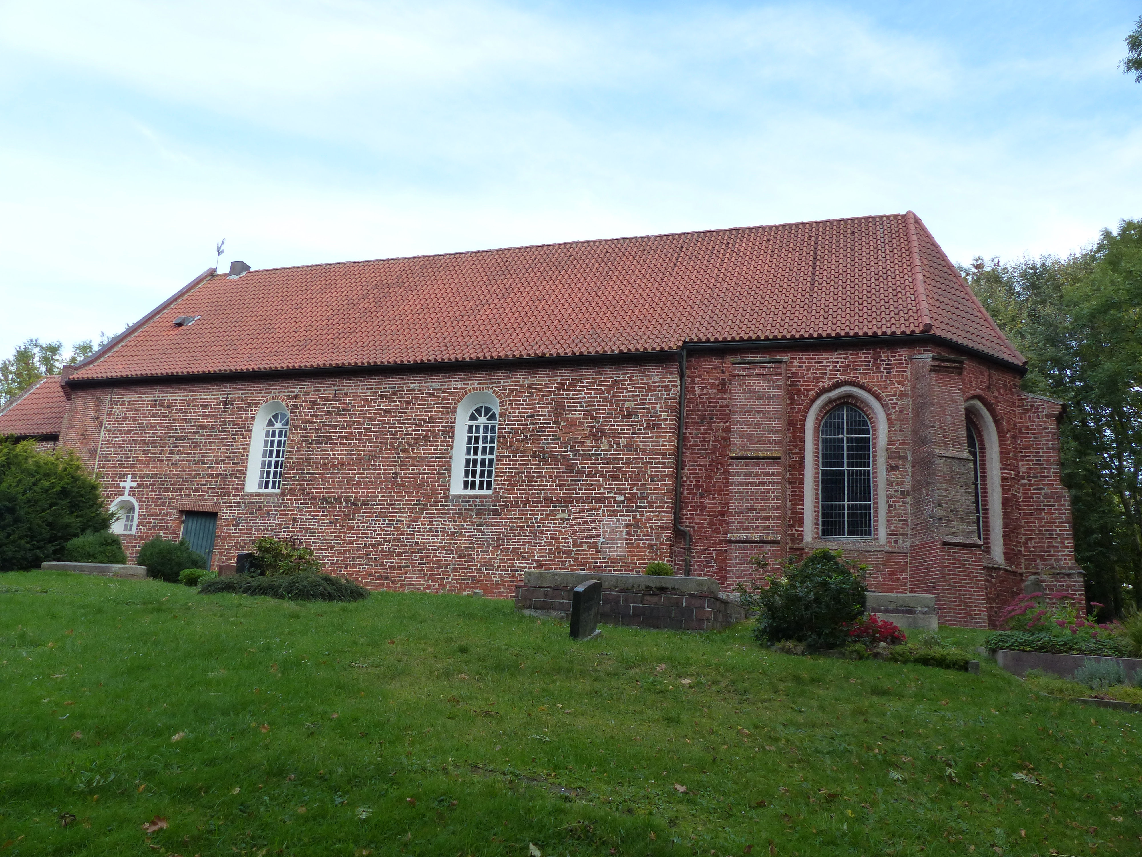 Südseite der Backsteinkirche in Tossens, romanisches Schiff, gotischer Chor